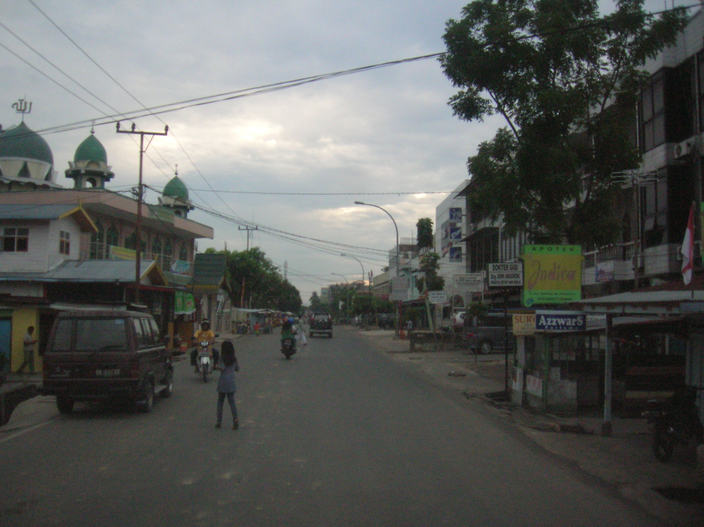 Salah satu jalan di Kota Pekanbaru